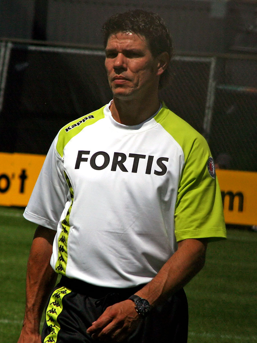 Patrick Lodewijks (Feyenoord)